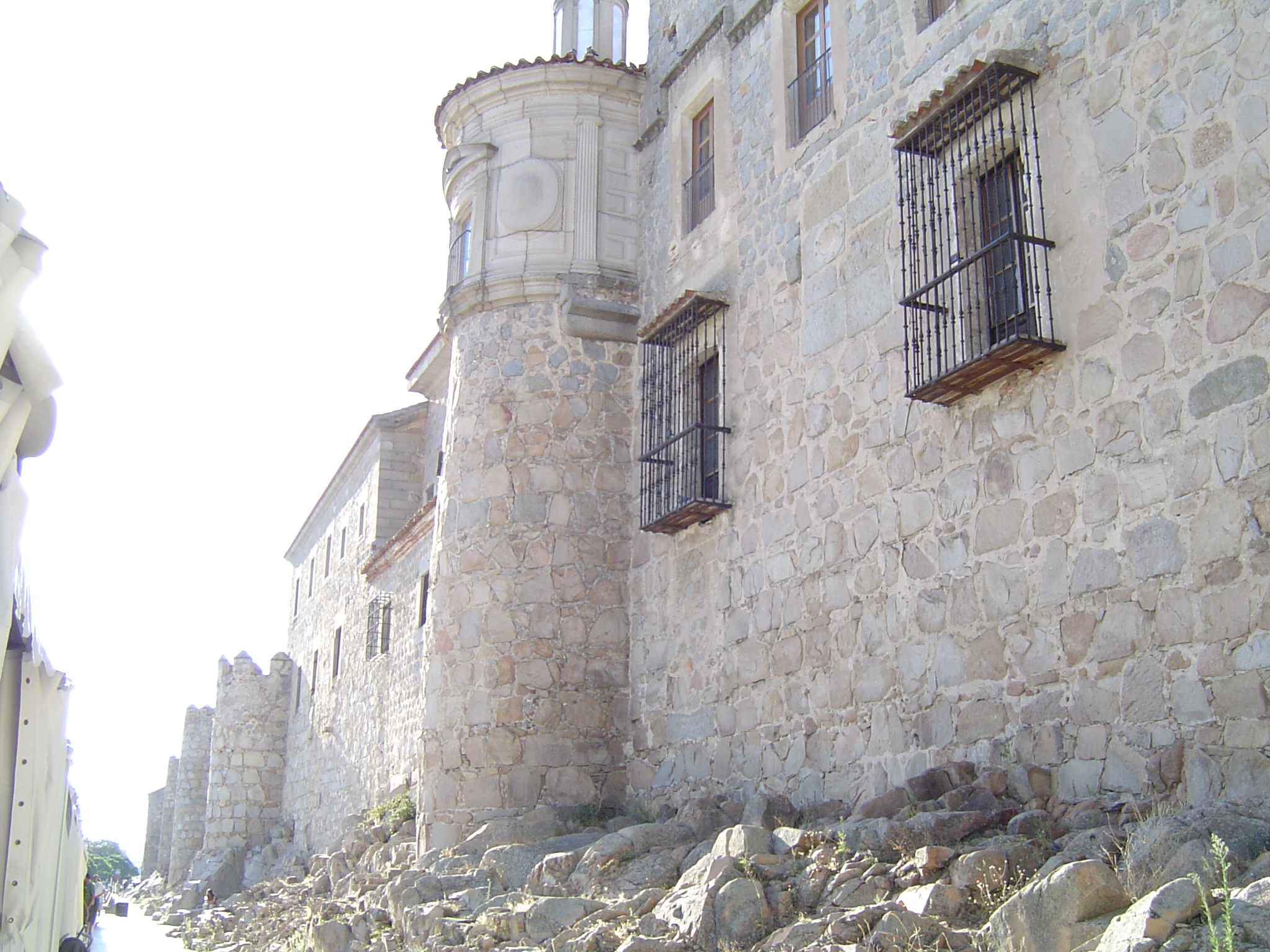 Murallas de Ávila